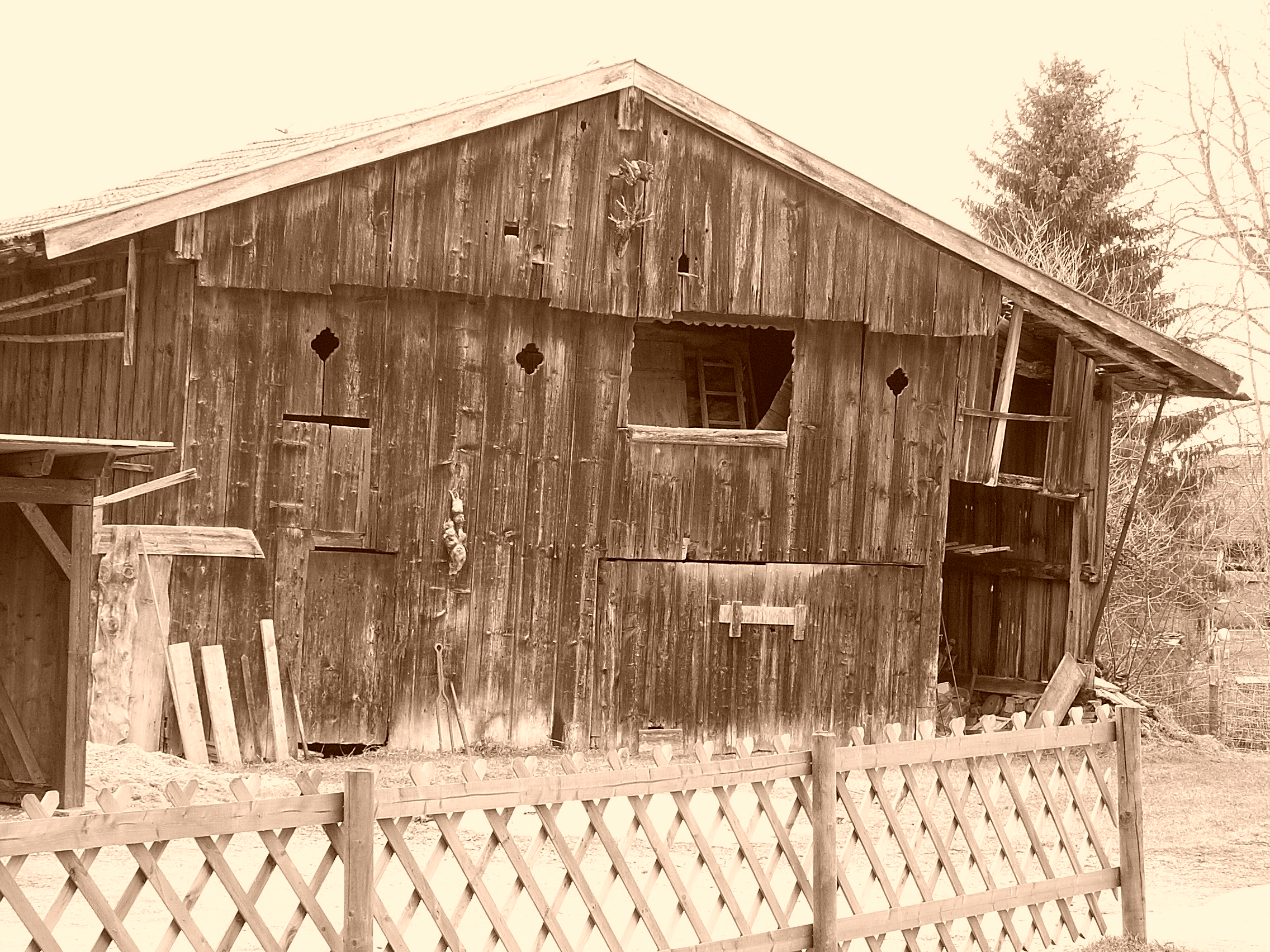 Getreidekasten Dorfstr. 25 in Urspring, Steingaden